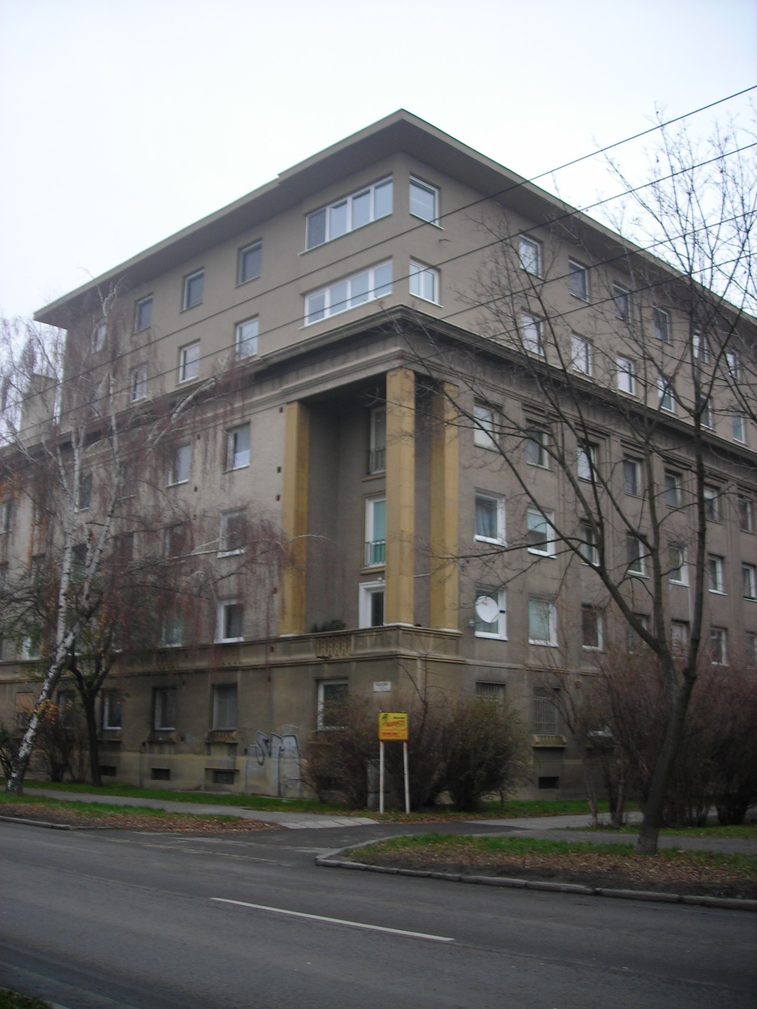 sídlisko na Miletičovej ulici v Bratislave